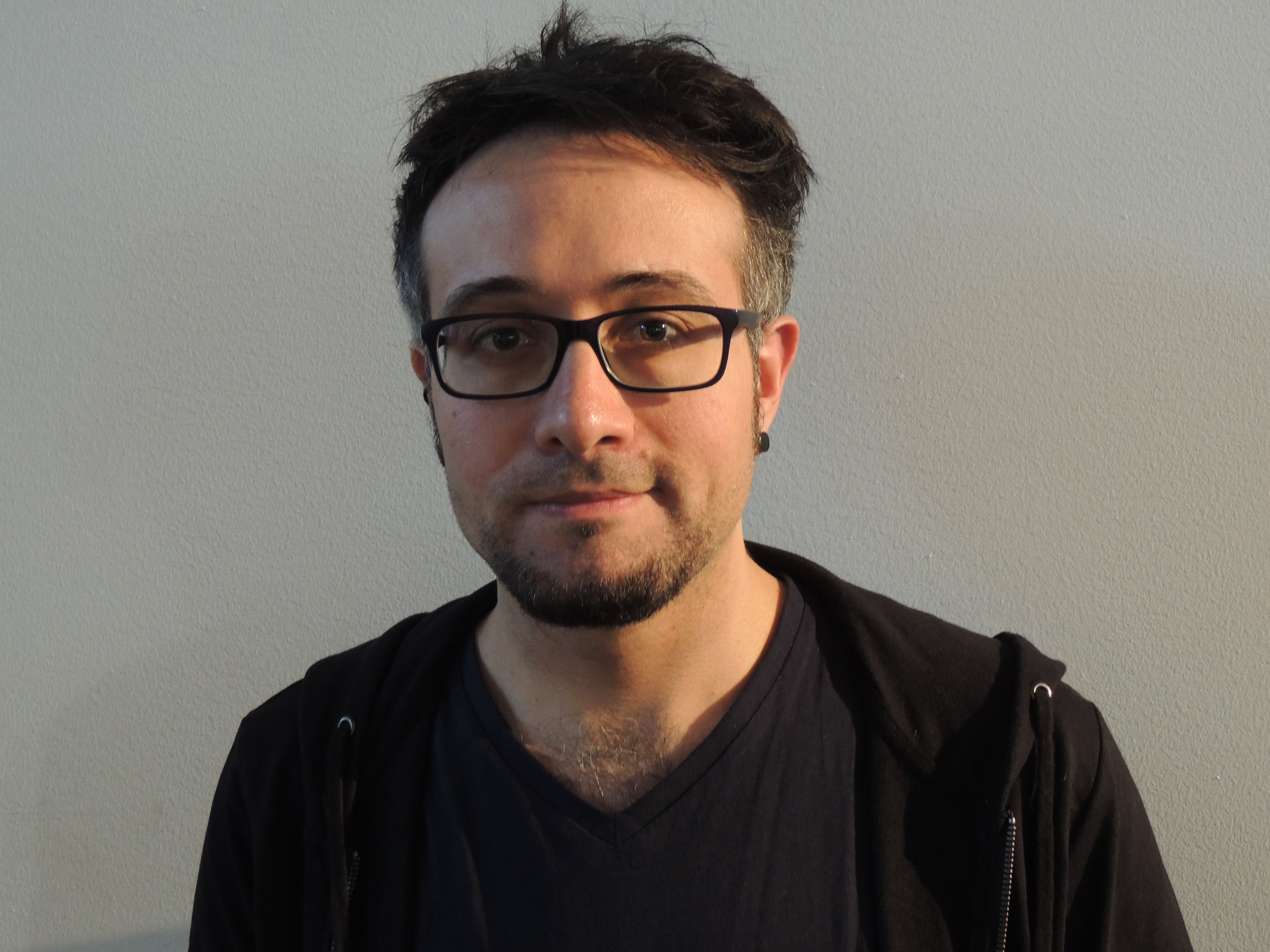 Il fumettista Daniel Cuello durante un evento della casa editrice BAO publishing presso BASE Milano